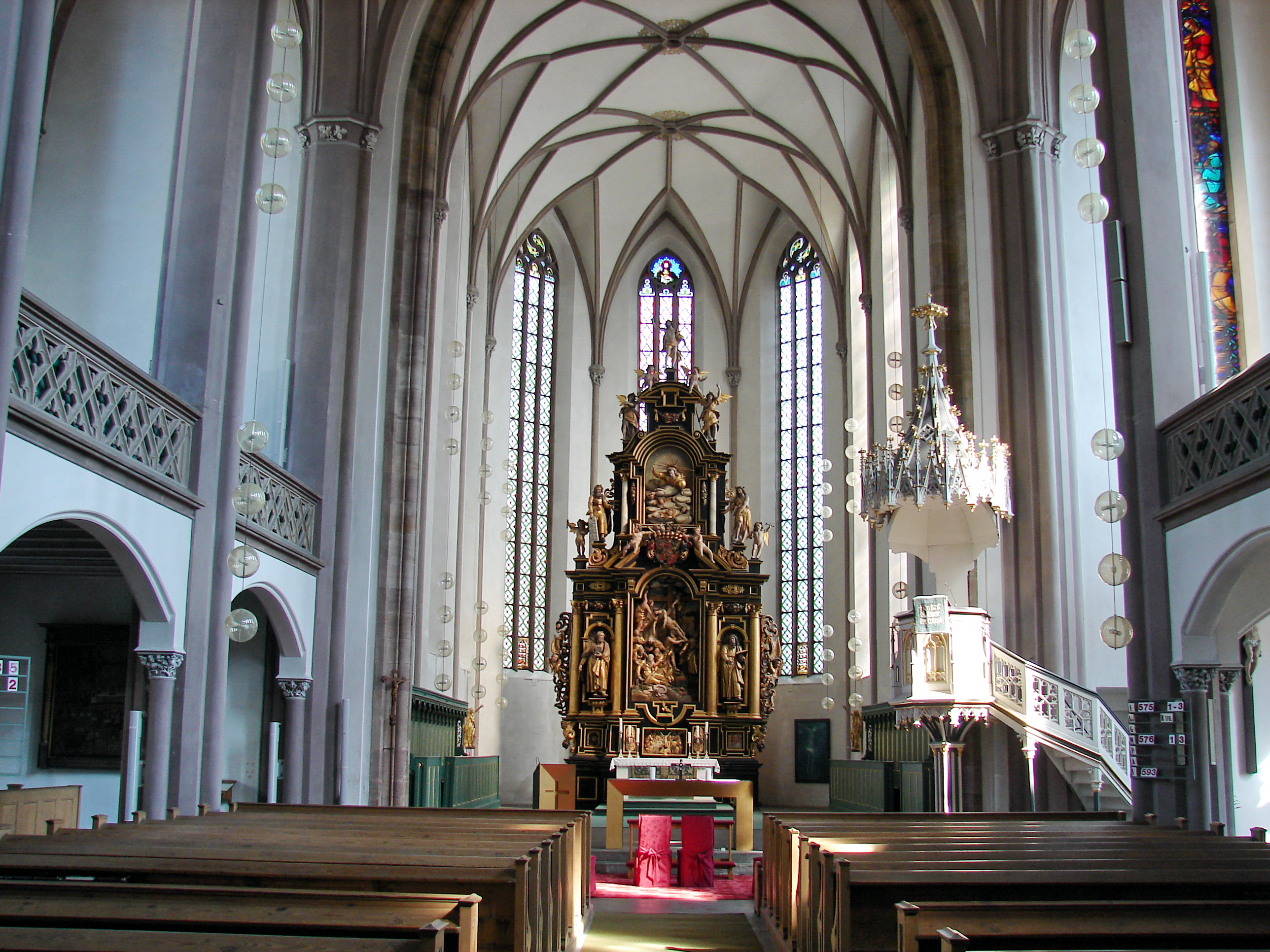 Die evangelisch-lutherische Petrikirche ist die vermutlich älteste Kirche von Kulmbach.